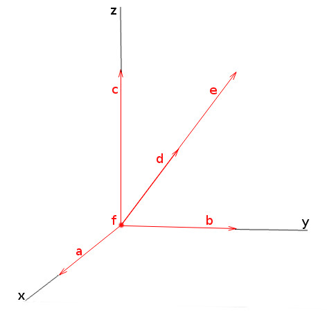 Vektoren zur Veranschaulichung eines Matroids M=(E,I) mit E = {a,b,c,d,e,f} und I = a},{b},{c},{d},{e},{a,b},{a,c},{a,d},{a,e},{b,c},{b,d},{b,e},{c,d},{c,e},{a,b,c},{a,b,d},{a,b,e},{a,c,d},{a,c,e